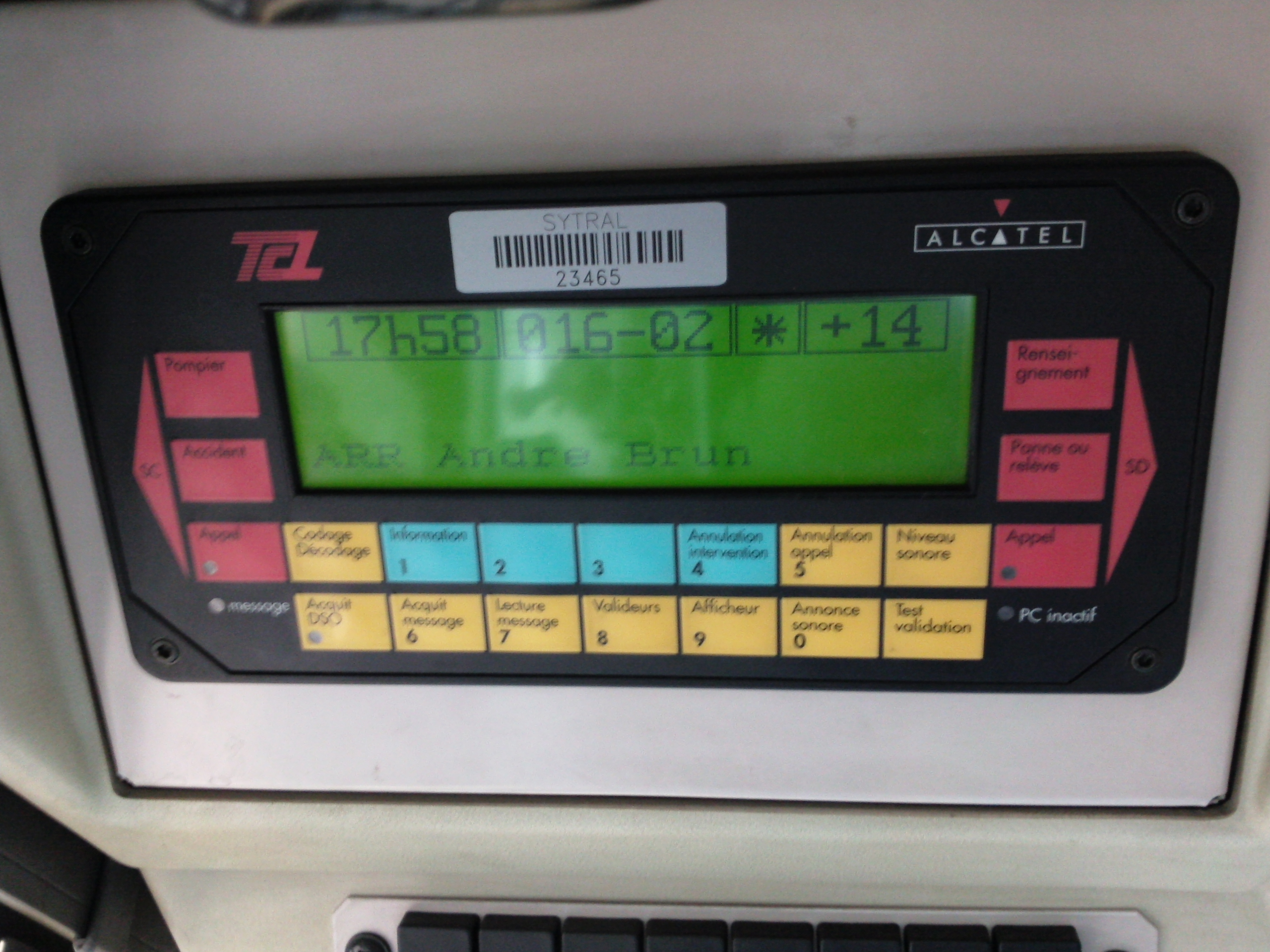 SAEIV d'un bus de la ligne 16, des Transports en Commun Lyonnais.